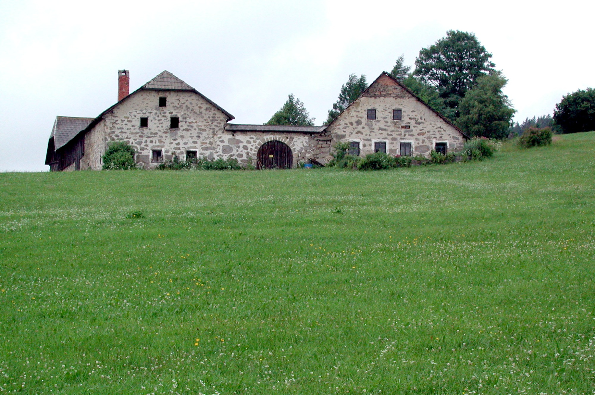 en: Old farmhouse near Karlstift in the Waldviertel region, Lower Austria de: Alter Bauernhof bei Karlstift im Waldviertel, Niederösterreich